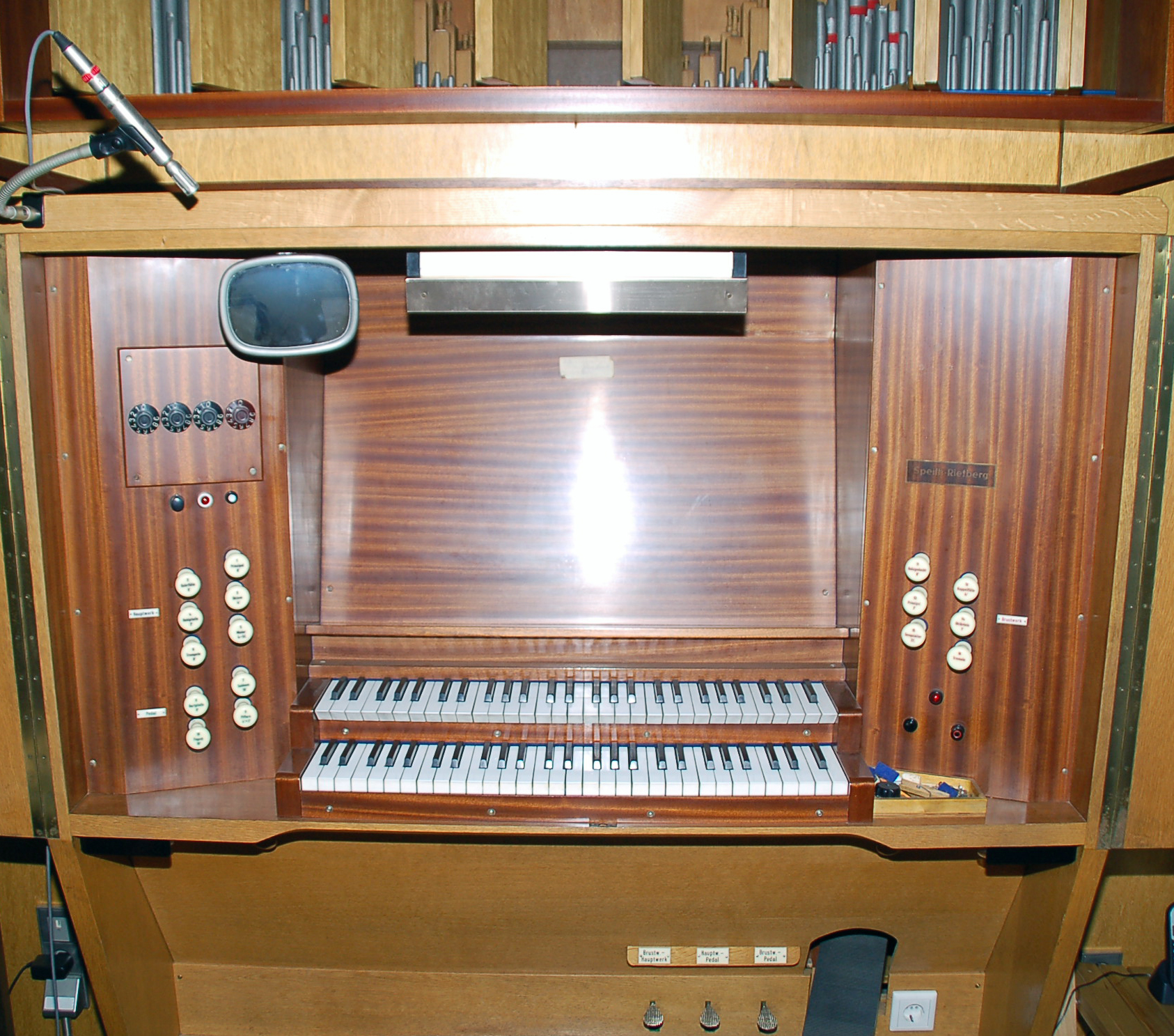 Orgelmanual